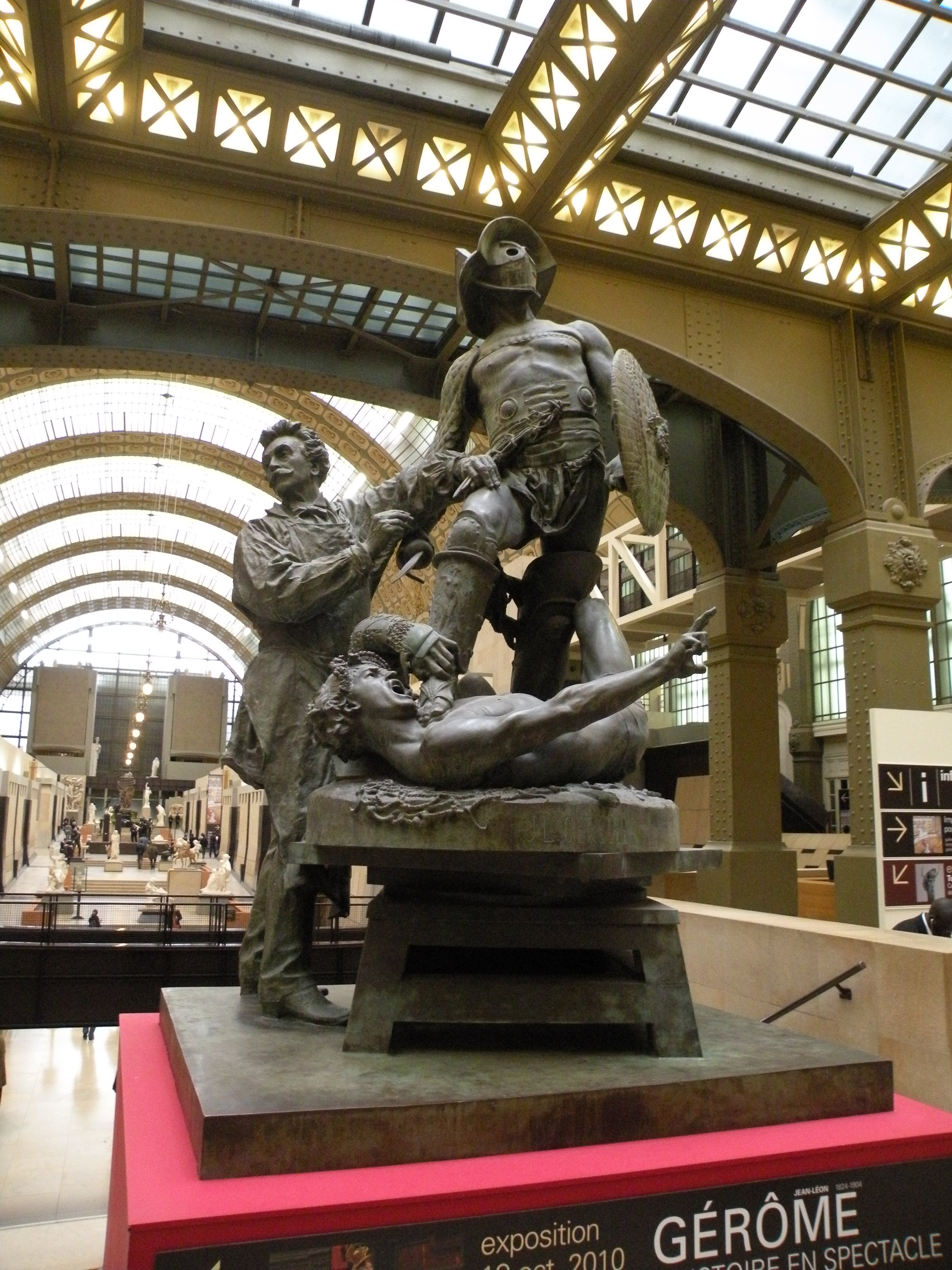 statue d'un gladiateur par Jean-Léon Gérôme